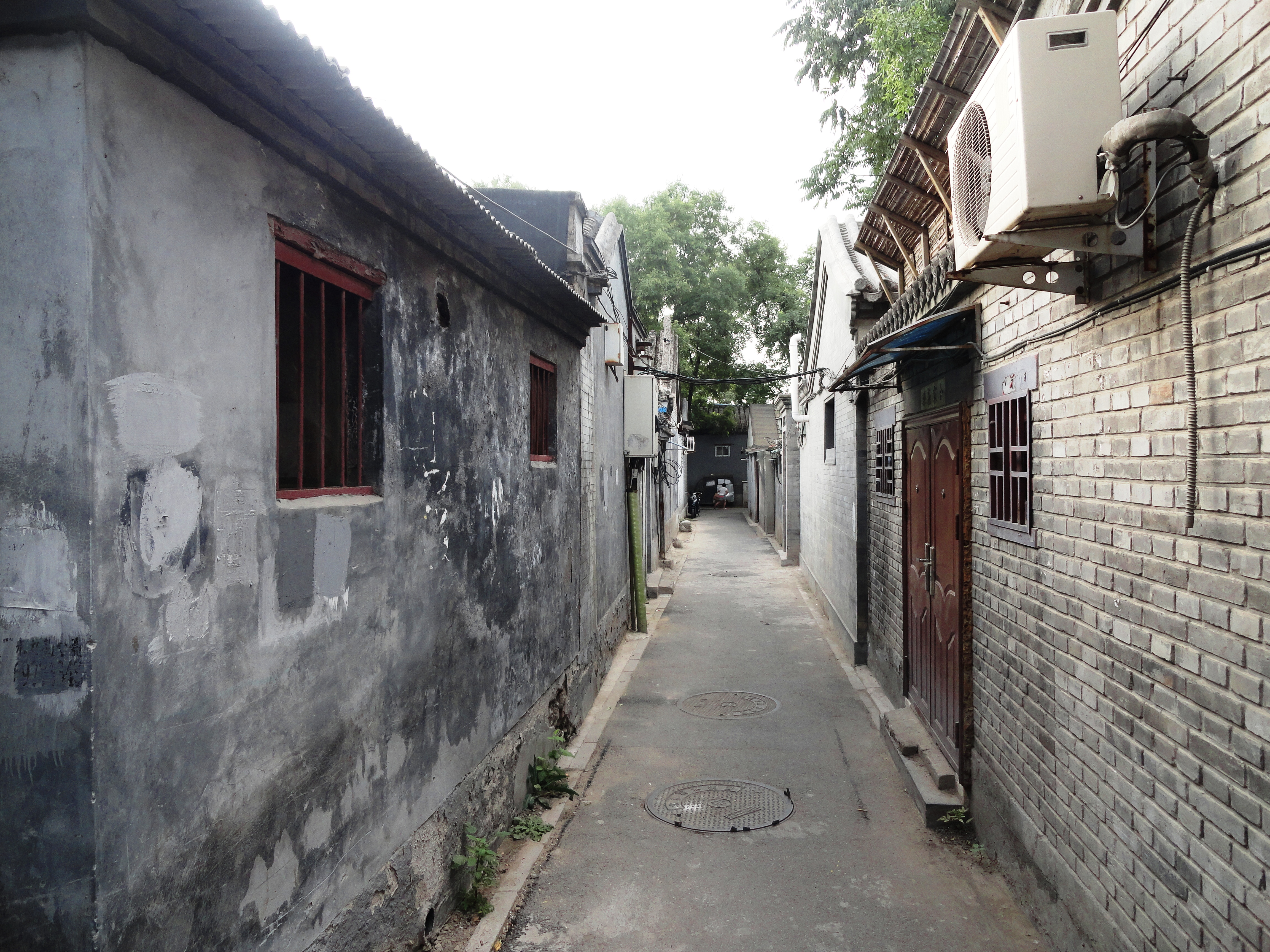 Nanluogu Xiang Hutong, Beijing, China